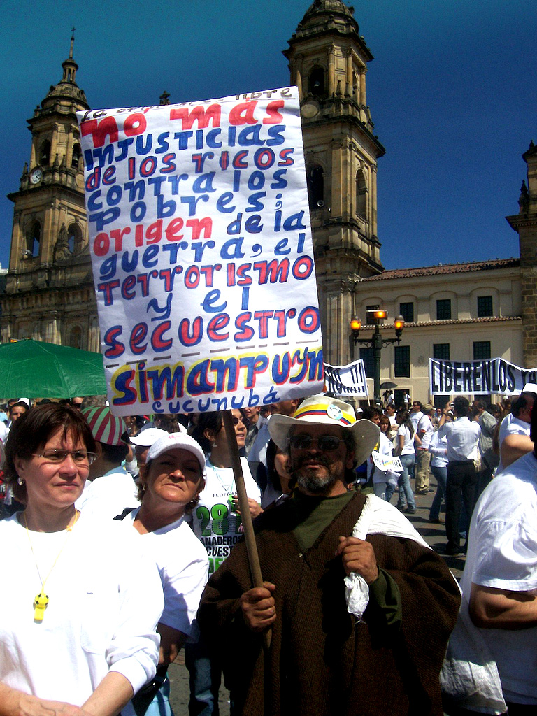 Manifestante en Colombia contra las FARC durante las manifestaciones mundiales del 4 de febrero de 2008 Foto: Julián Ortega Martínez / equinoXio